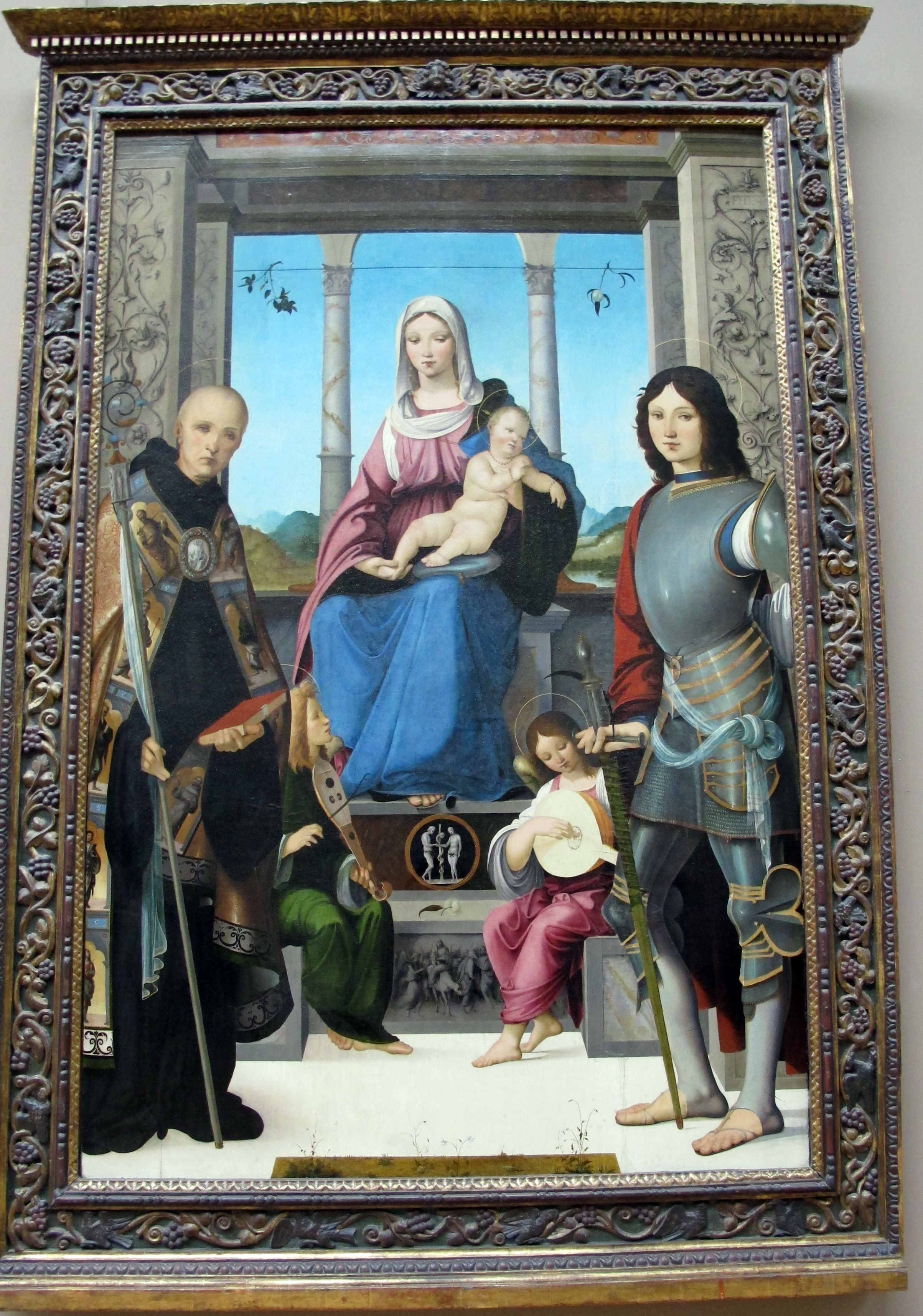 Pittura italiana del Quattrocento al Louvre, Parigi